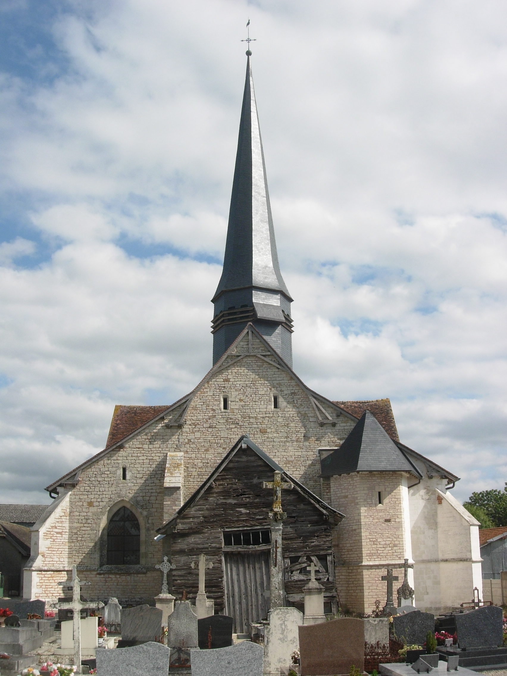 Eglise de Montmorency-Beaufort